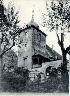 Der Dalberger Hof in Bensheim auf einer Postkarte aus dem Jahr 1906